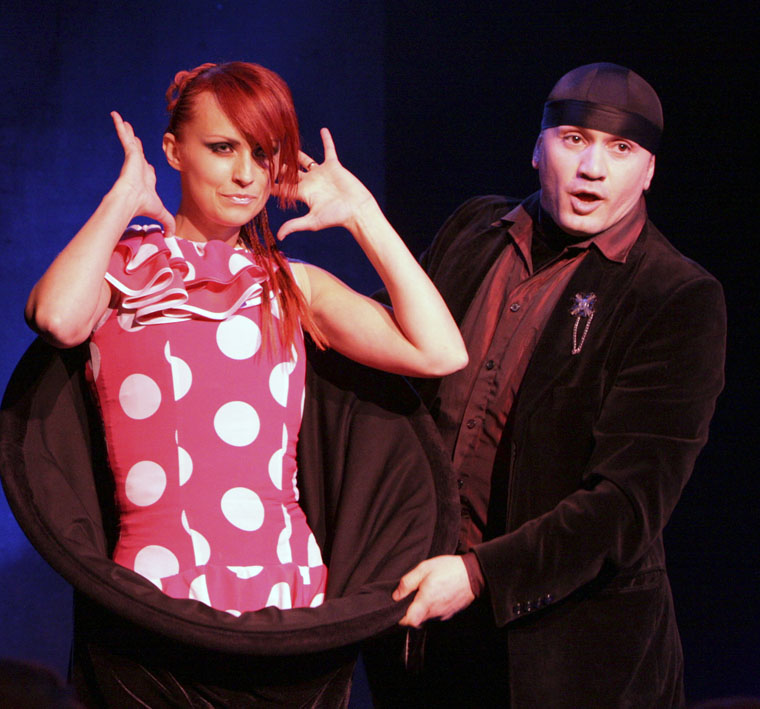 Die Verwandlungskünstler Sos und Victoria Petroysn